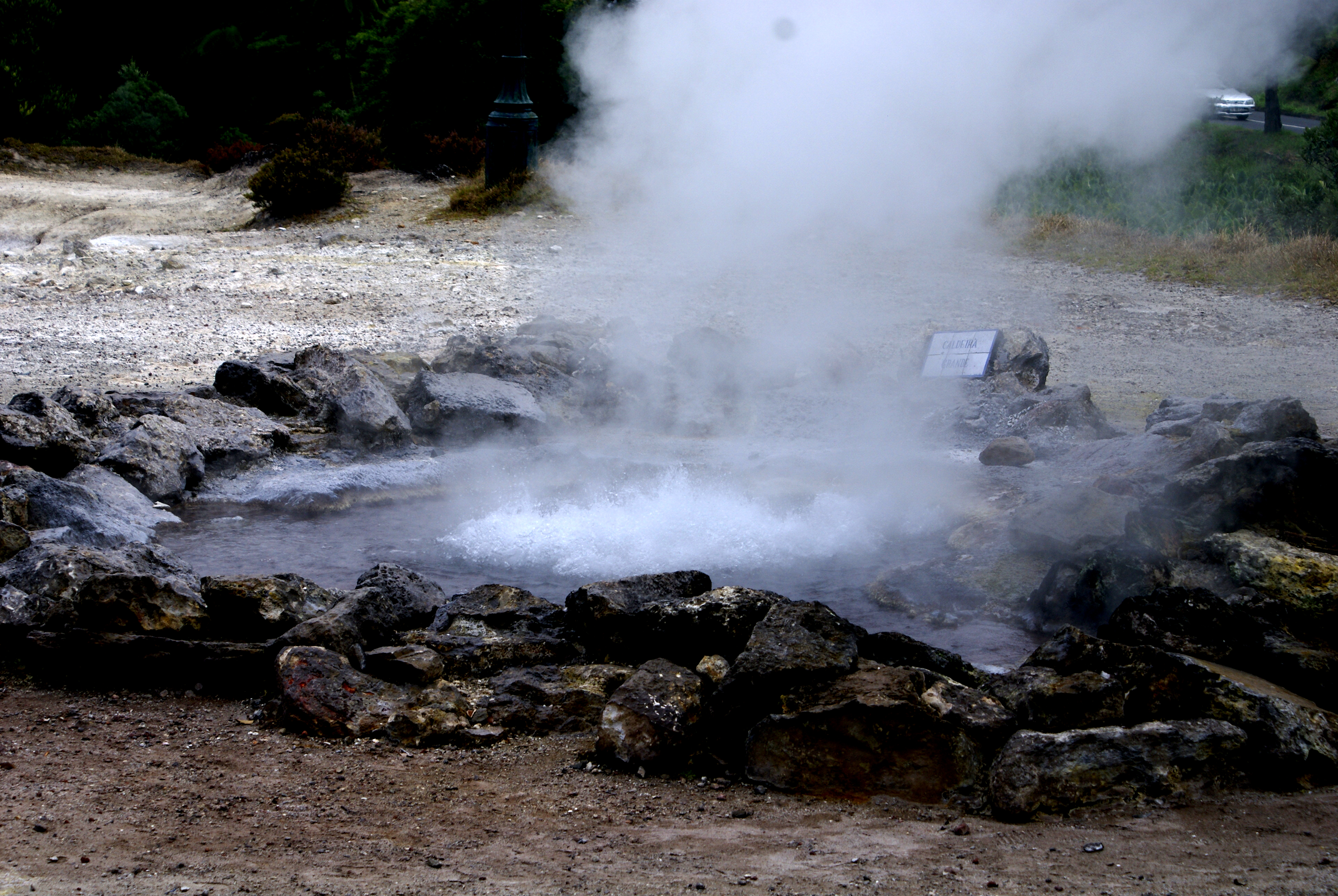 Caldeira a Ferver, Vale das Furnas, Povoação, ilha de São Miguel, Açores